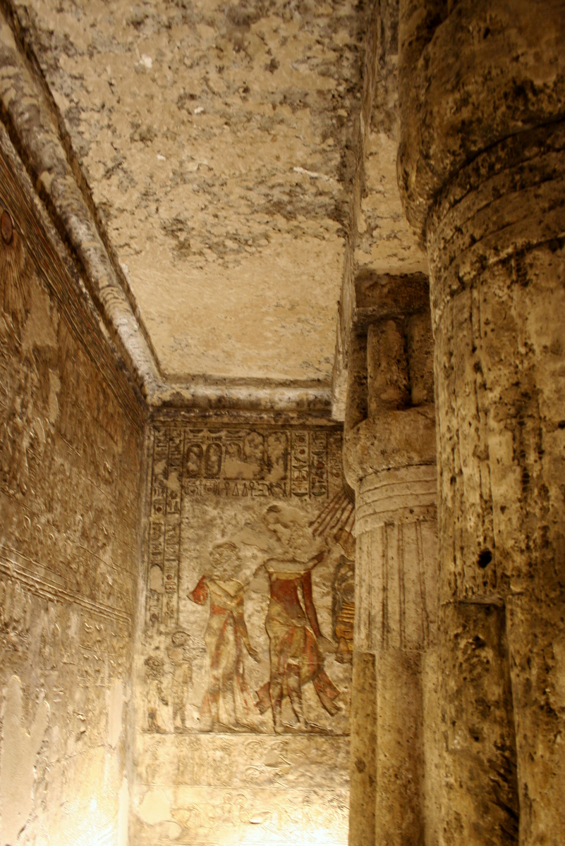 Tombe de Tell el-Amarna - Deux colonnes, au fond, le couple royal et leur deux premières filles